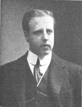 D. Luis Martínez Kleisser. Obra del fotógrafo Kaulak.